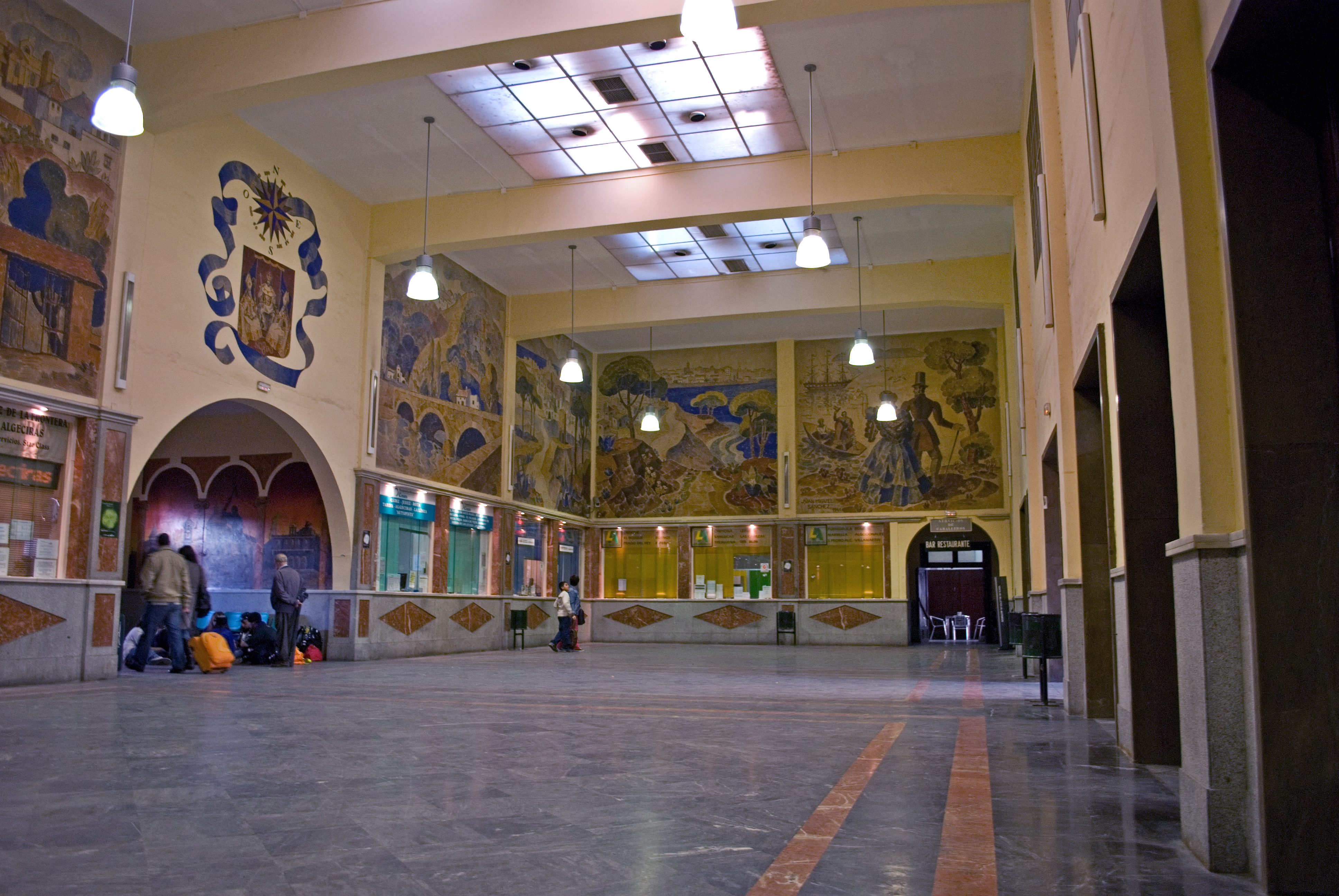 Salón de la estación de autobuses del Prado de San Sebastián (Sevilla). Arquitectos Juan Talavera y Heredia - Rodrigo y Felipe de Medina Benjumea (1941). Pinturas de Juan Miguel Sánchez